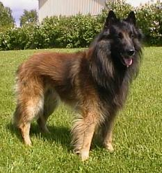 Belgisk vallhund / tervueren (hane)